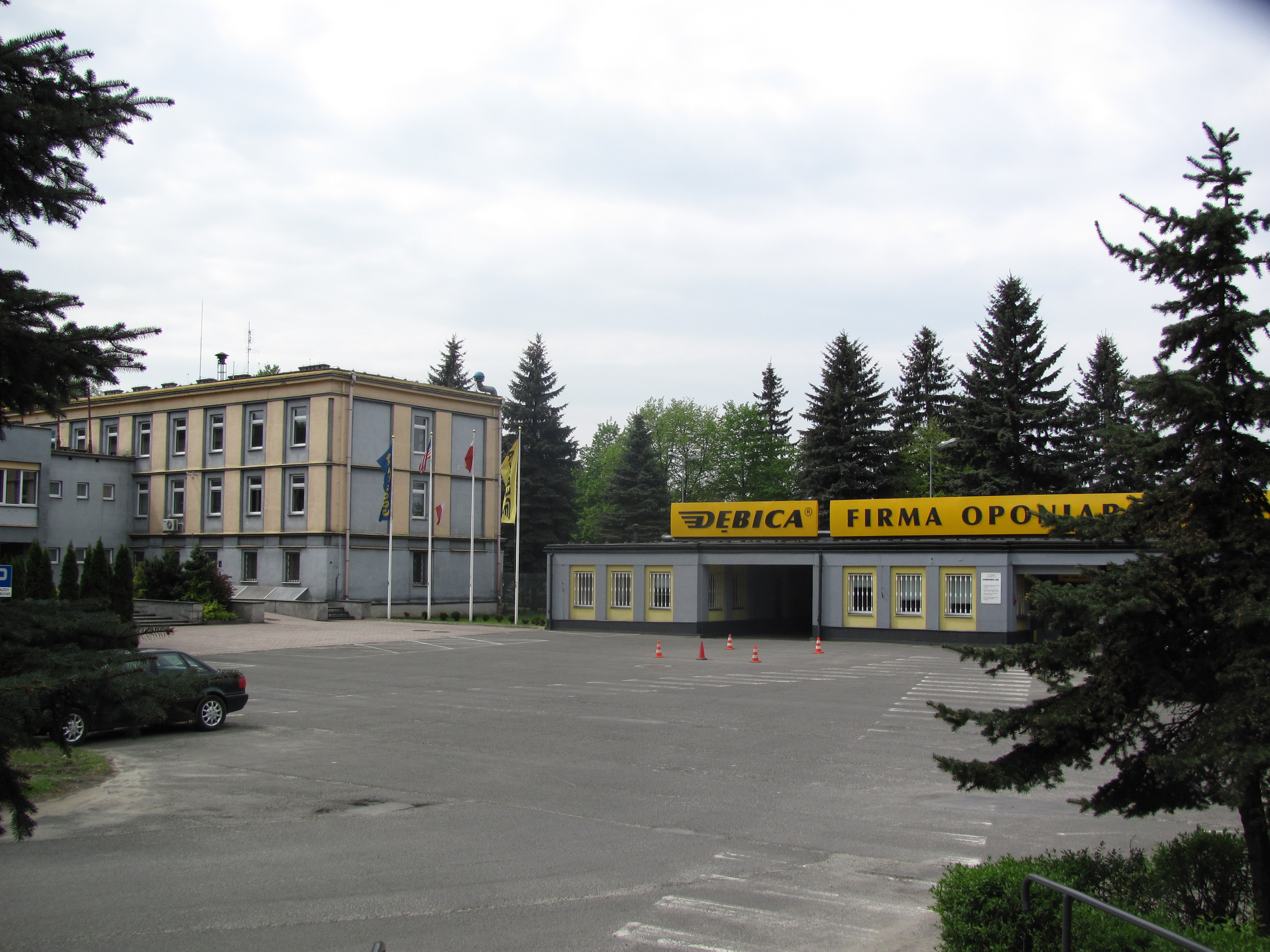 Dębica opony